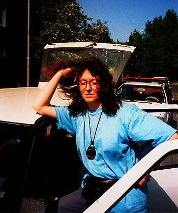 Maria Anna Potocka, art historian from Poland